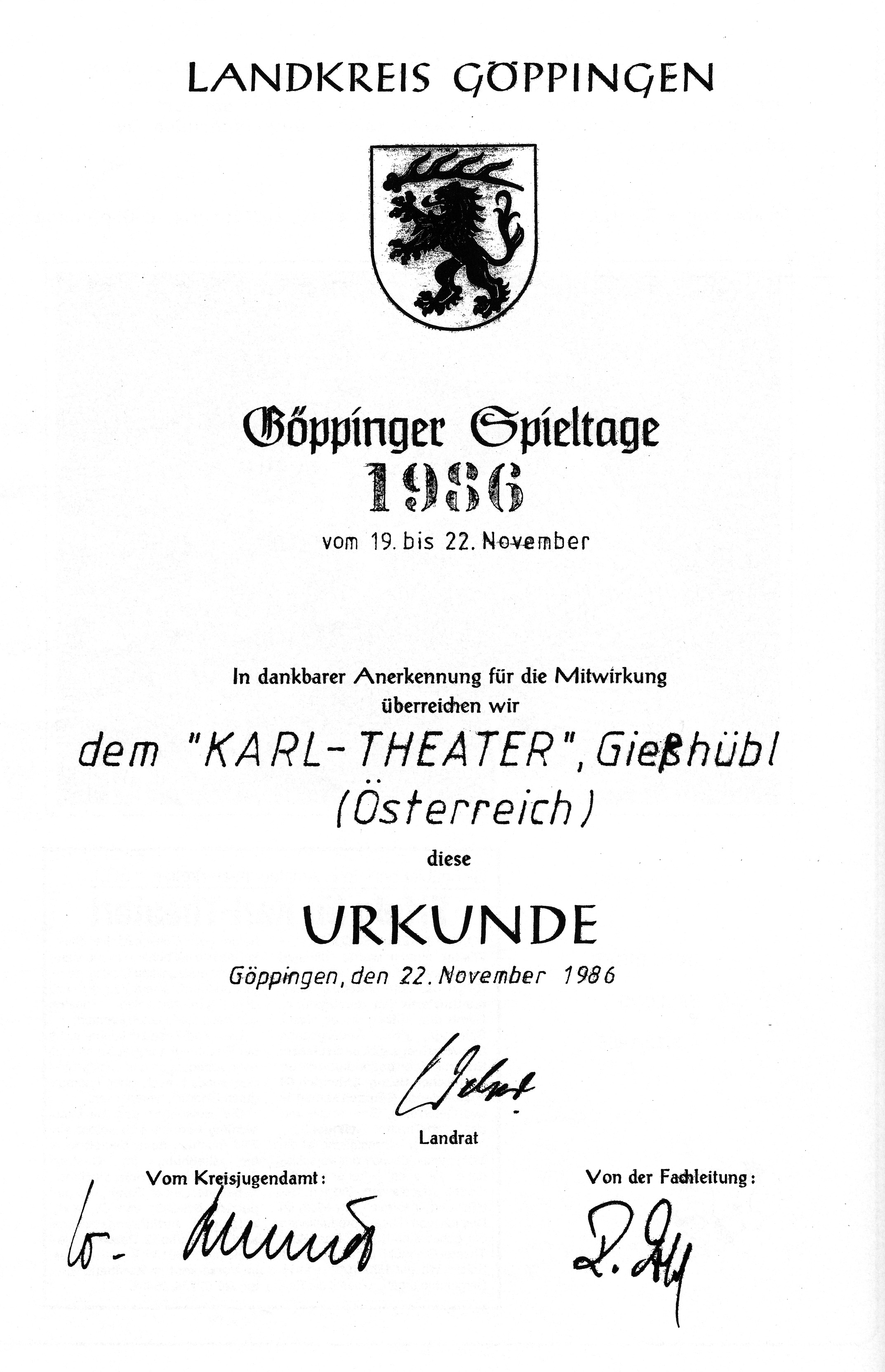 Urkunde über die Teilnahme des Karl-Theater Gießhübl an den Göppinger Spieltagen 1986